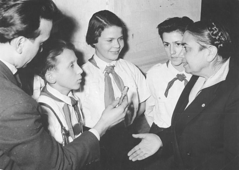 Steinpleis, Jugendweihe, Hilde Benjamin Zentralbild Schlegel 9.2.1958 Minister Dr. Hilde Benjamin sprach in Steinpleis Am 7.2.1958 sprach der Minister für Justiz Dr. Hilde Benjamin in Steinpleis, Kreis Werdau, vor rund 200 Teilnehmern an der Jugendweihe und beantwortete viele Fragen der Jugendlichen. UBz: Minister Dr. Hilde Benjamin im Gespräch mit Teilnehmern der Jugendweihe.